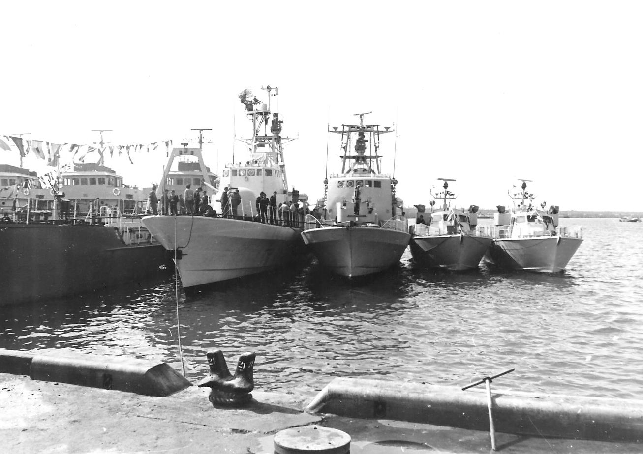 נחתות ספינות טילים וספינות ביטחון שוטף בבסיס אשדוד